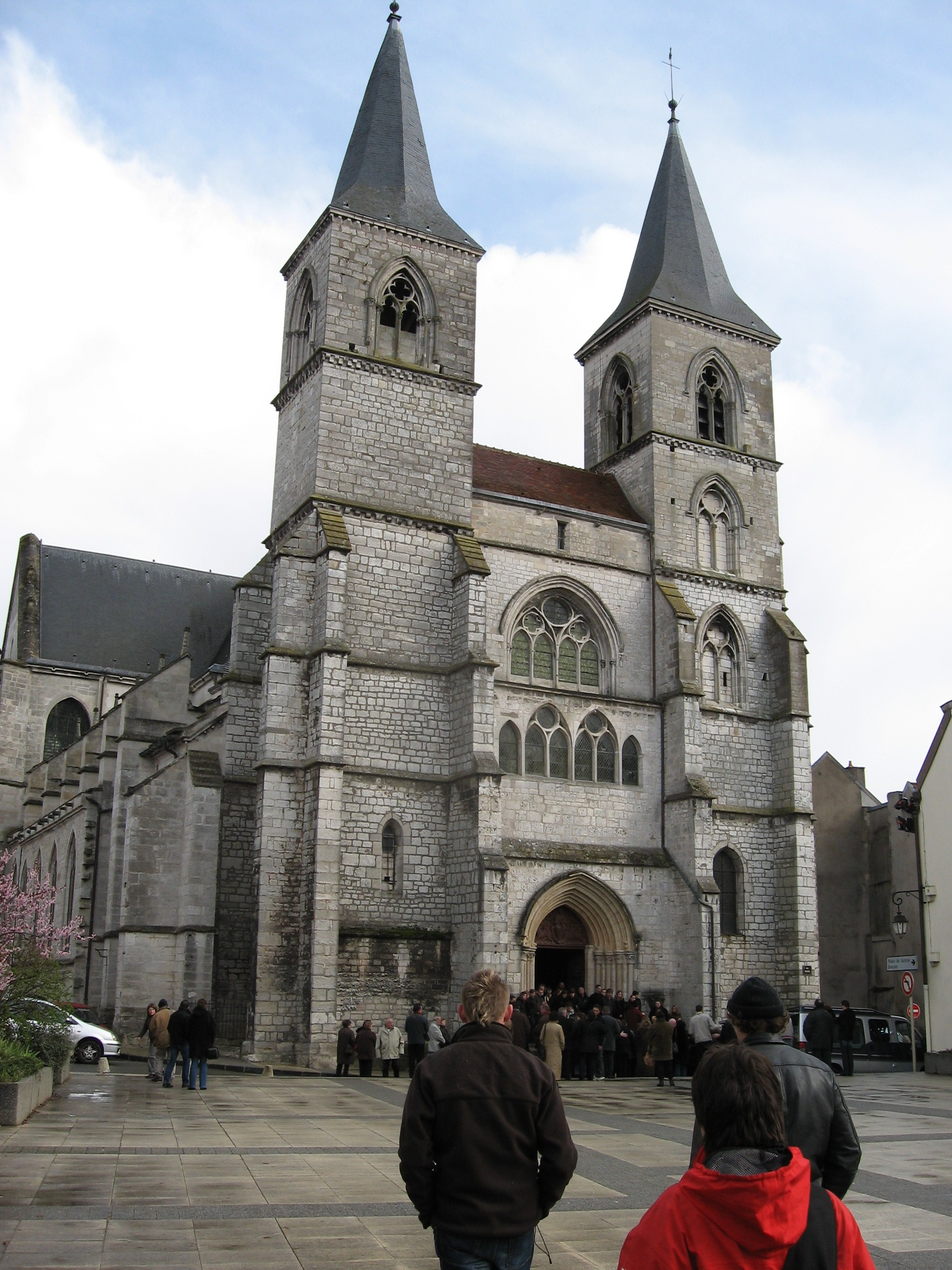 Chaumont: St. Jean Baptiste.